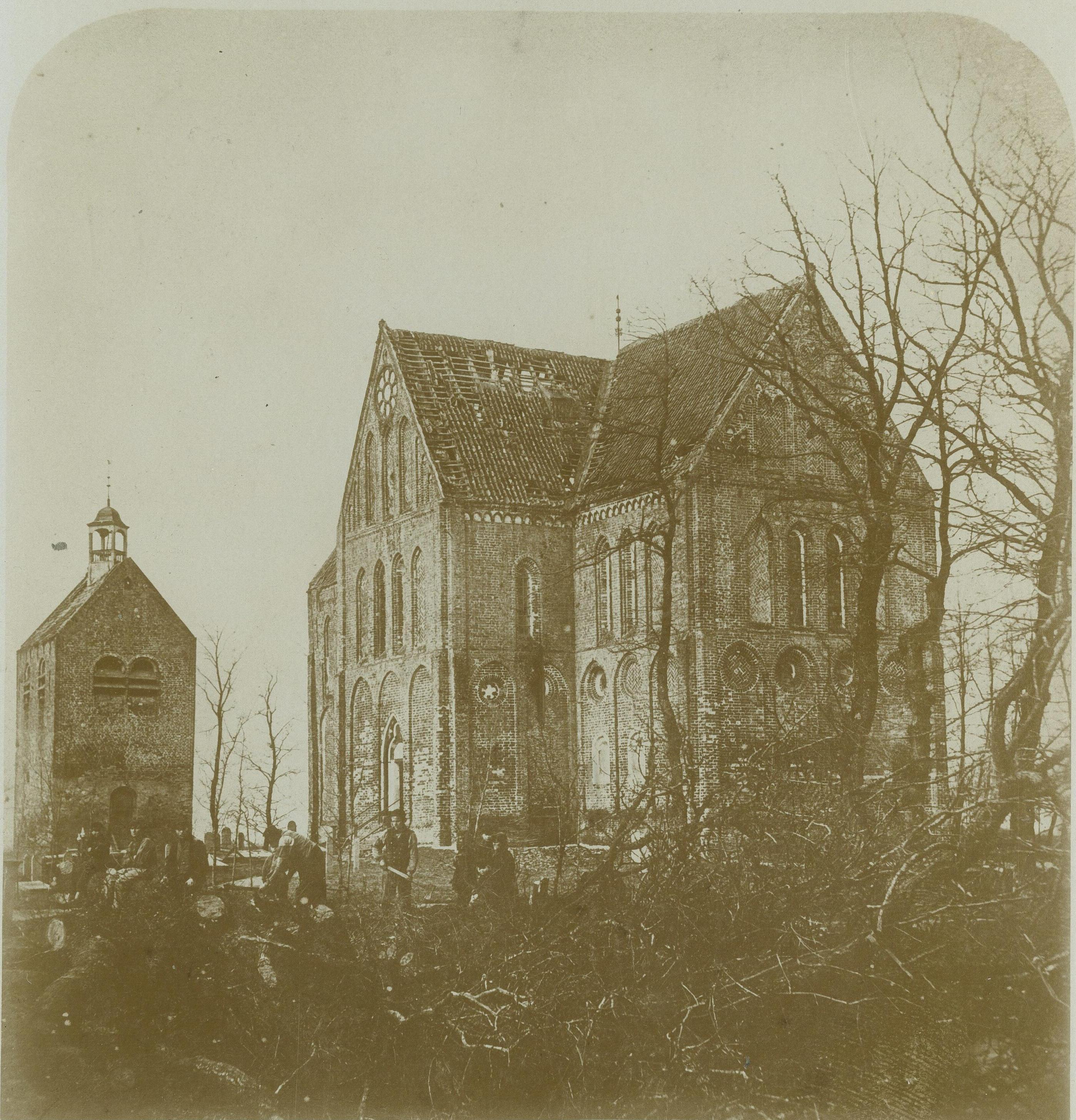 Kruiskerk van Eexta voor de sloop. Mannen kappen en zagen hout op de voorgrond.